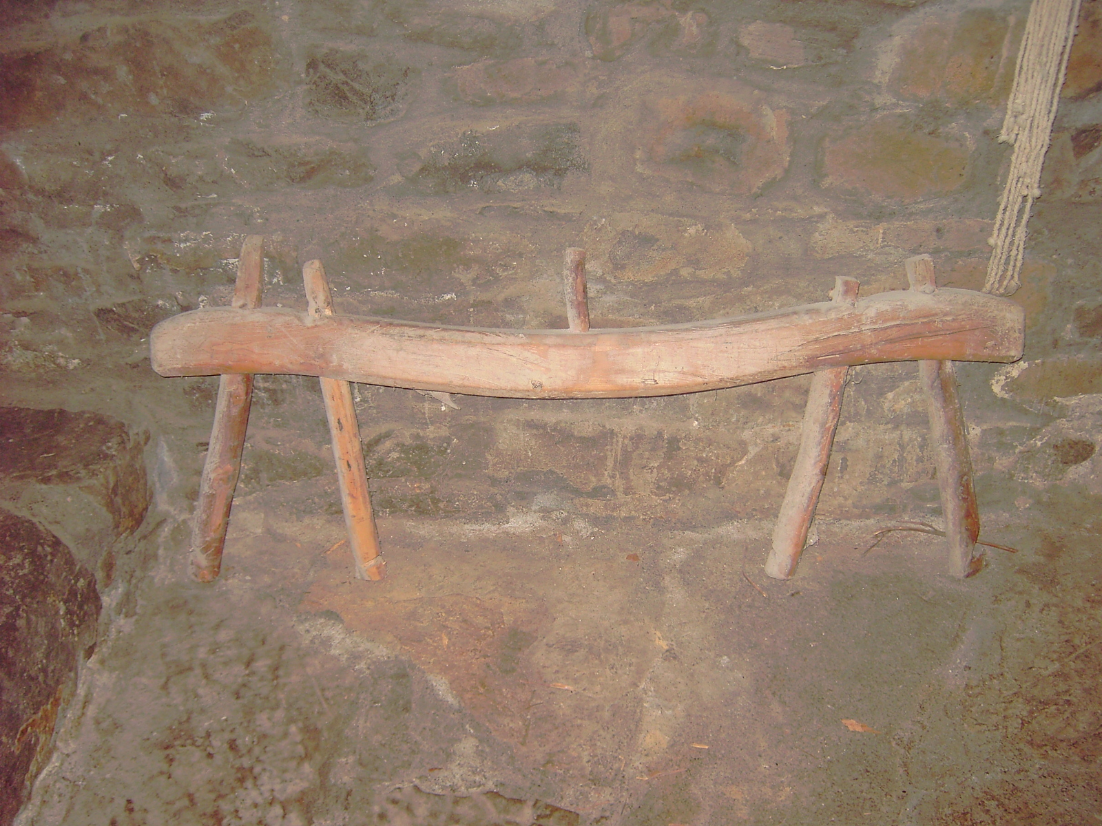 Yugo o Ixubo tradicional de Sobrarbe, en Huesca (España). En este caso, el mástil recto indica que era un modelo para uso con bueyes.